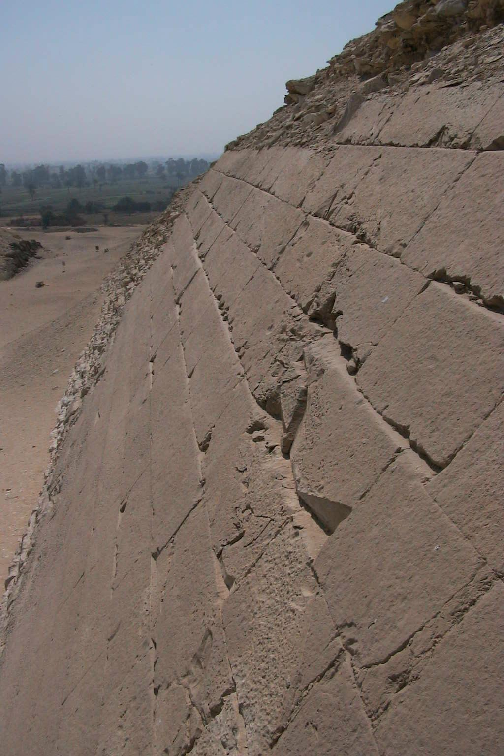 Intakter Teil der Fassade der Pyramide von Meidum. Fotografiert am 09.06.2002 Das Fotos wurde von mir selbst erstellt und ist im Originalzustand (also nicht bearbeitet) Weitere Fotos unter